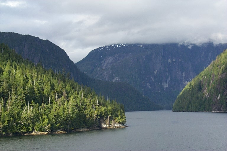 Inside Passage, Misty Fjords